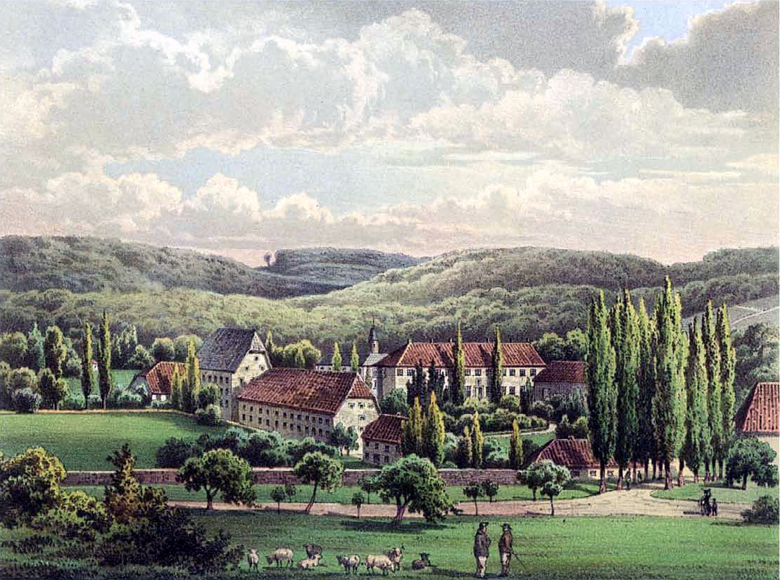 Hardehausen in der Provinz Westphalen im Regierungs-Bezirk Minden im Kreis Warburg Nach ein. Orig. Aufn. v. Carl Hohe, ausgef. v. Th. Albert Druck b. Winckelmann & Söhne Verlag v. Alexander Duncker Königl. Hofbuchhändler in Berlin